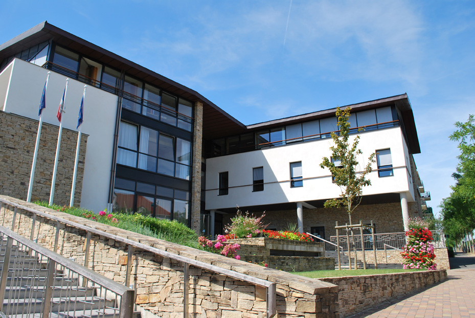 Hôtel de Ville de la commune de Magny le Hongre